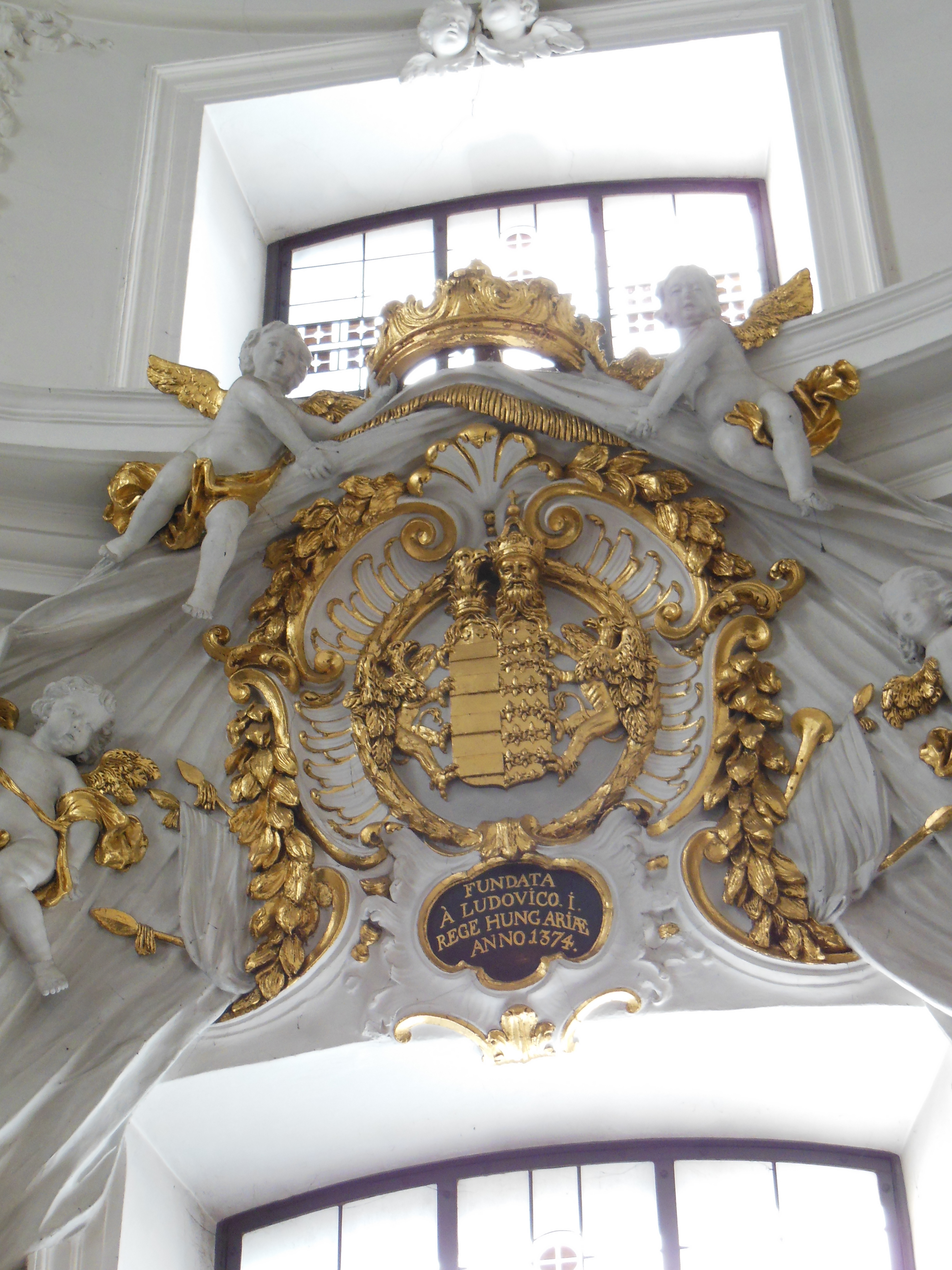 Az oltár felett